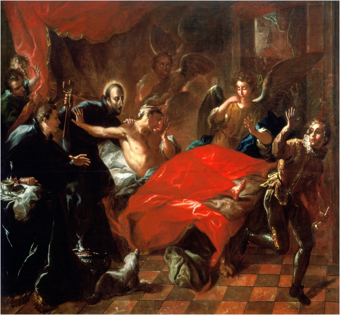 La obra representa a San Ignacio de Loyola, el fundador de la Compañía de Jesús, atendiendo a un enfermo.